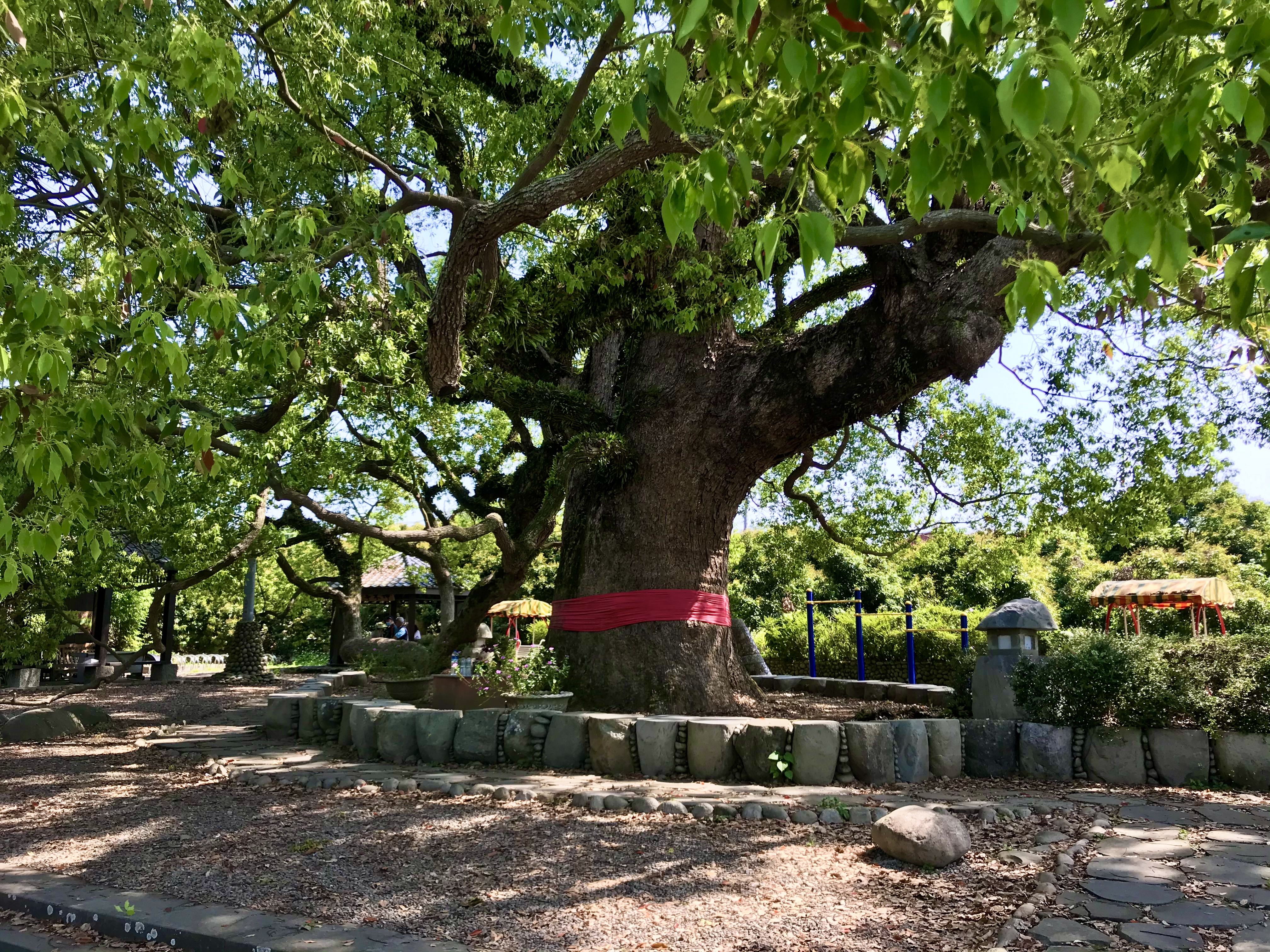 中文（台灣）: 坪頂神木樹下